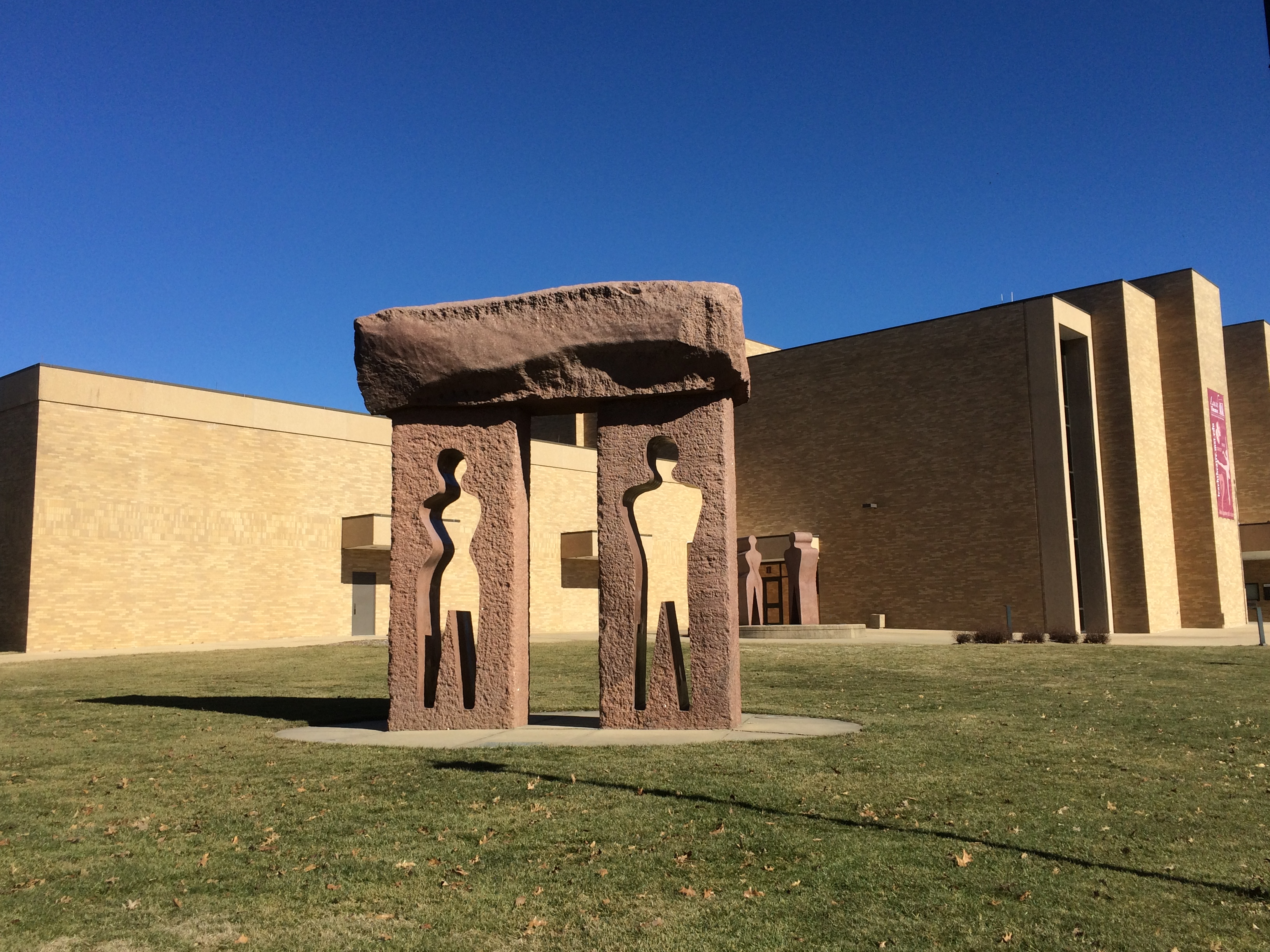 ミズーリS&T大学リーチシアター